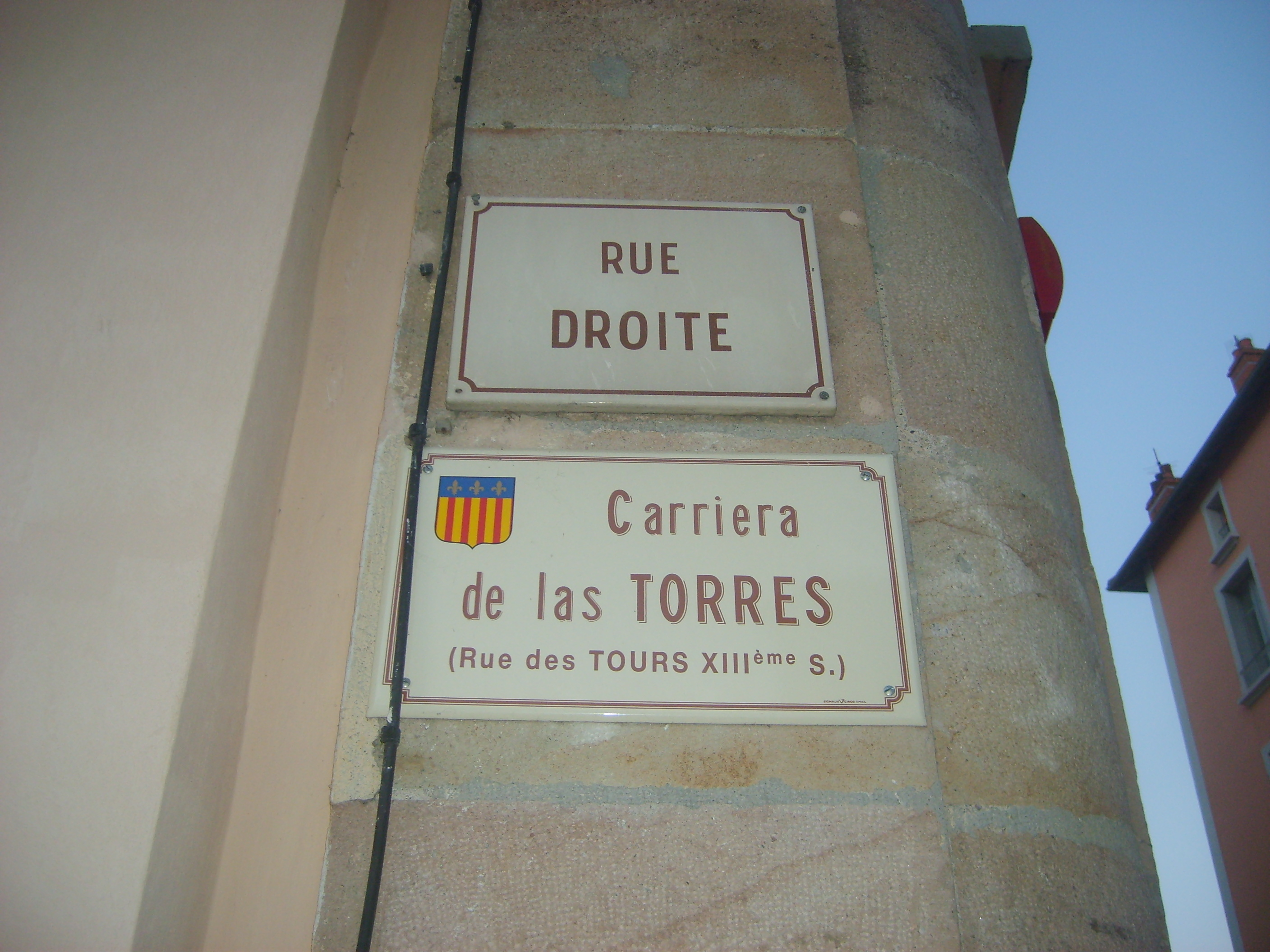 MILLAU TORRES